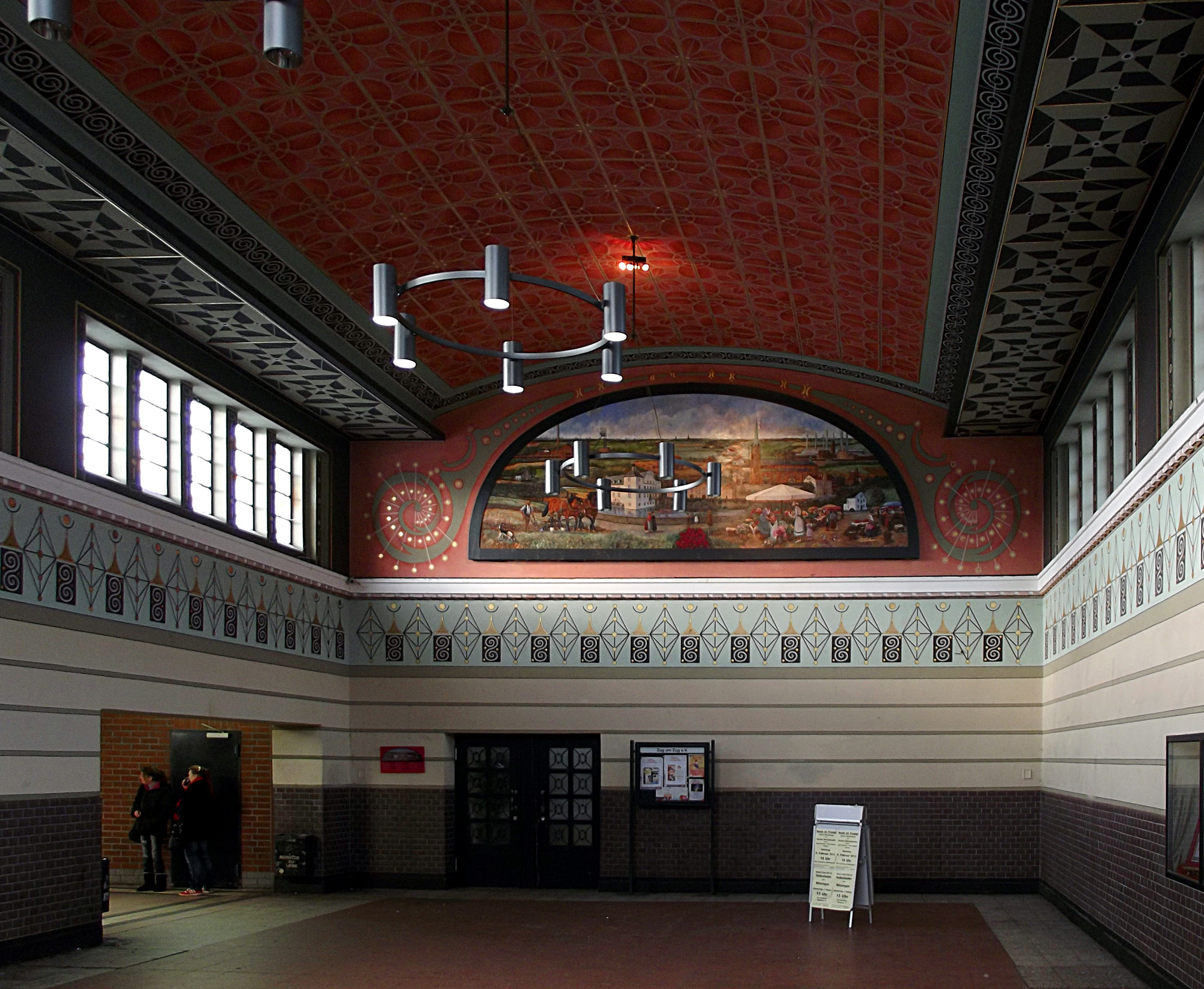 Im Jugendstil restaurierte Schalterhalle des Bahnhofs Essen-Borbeck (Marktstraße 11)